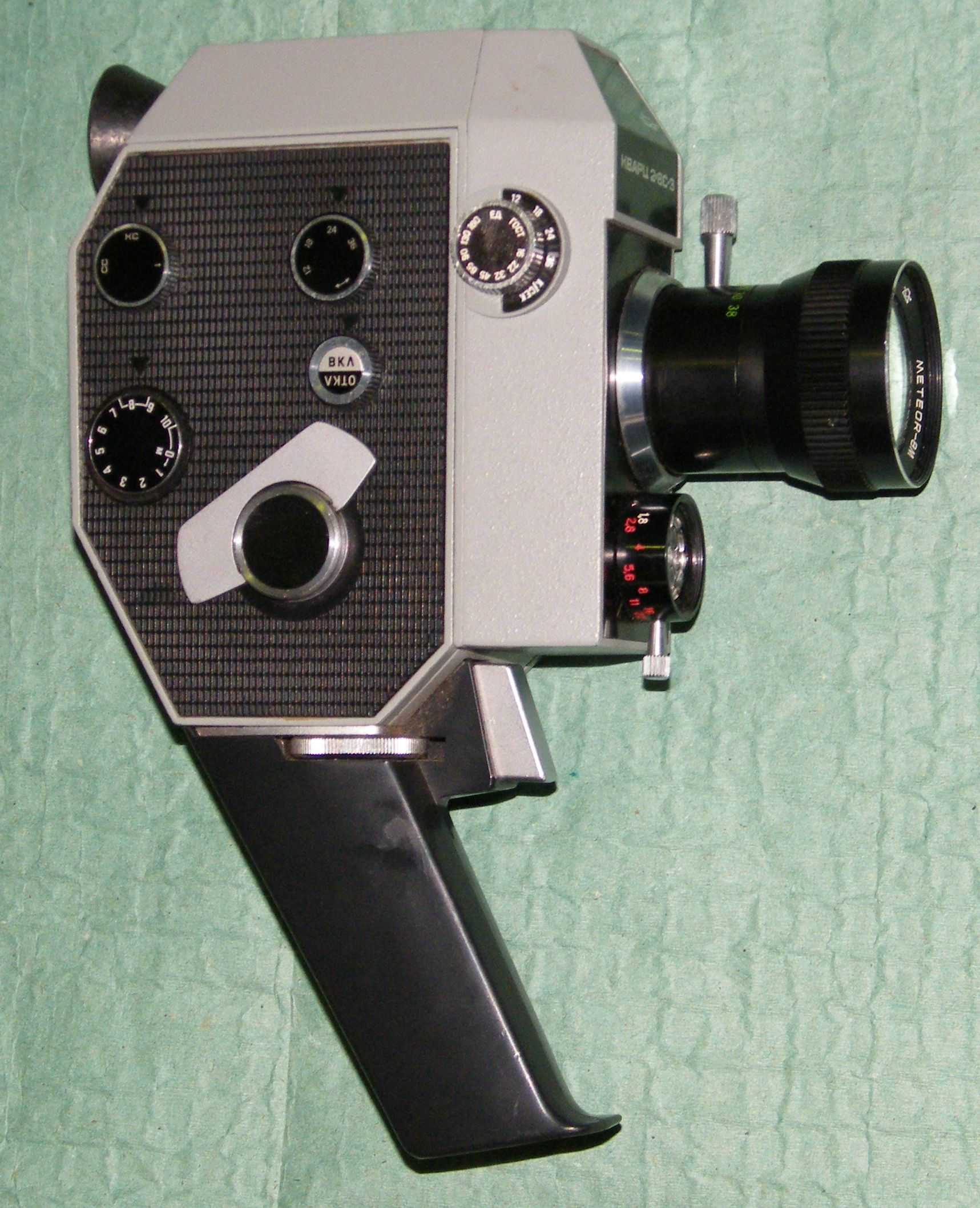 Кинокамера Кварц-2х8С-3 (КМЗ)